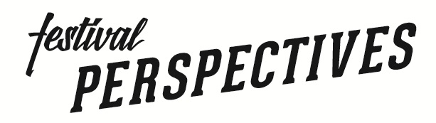 Logo